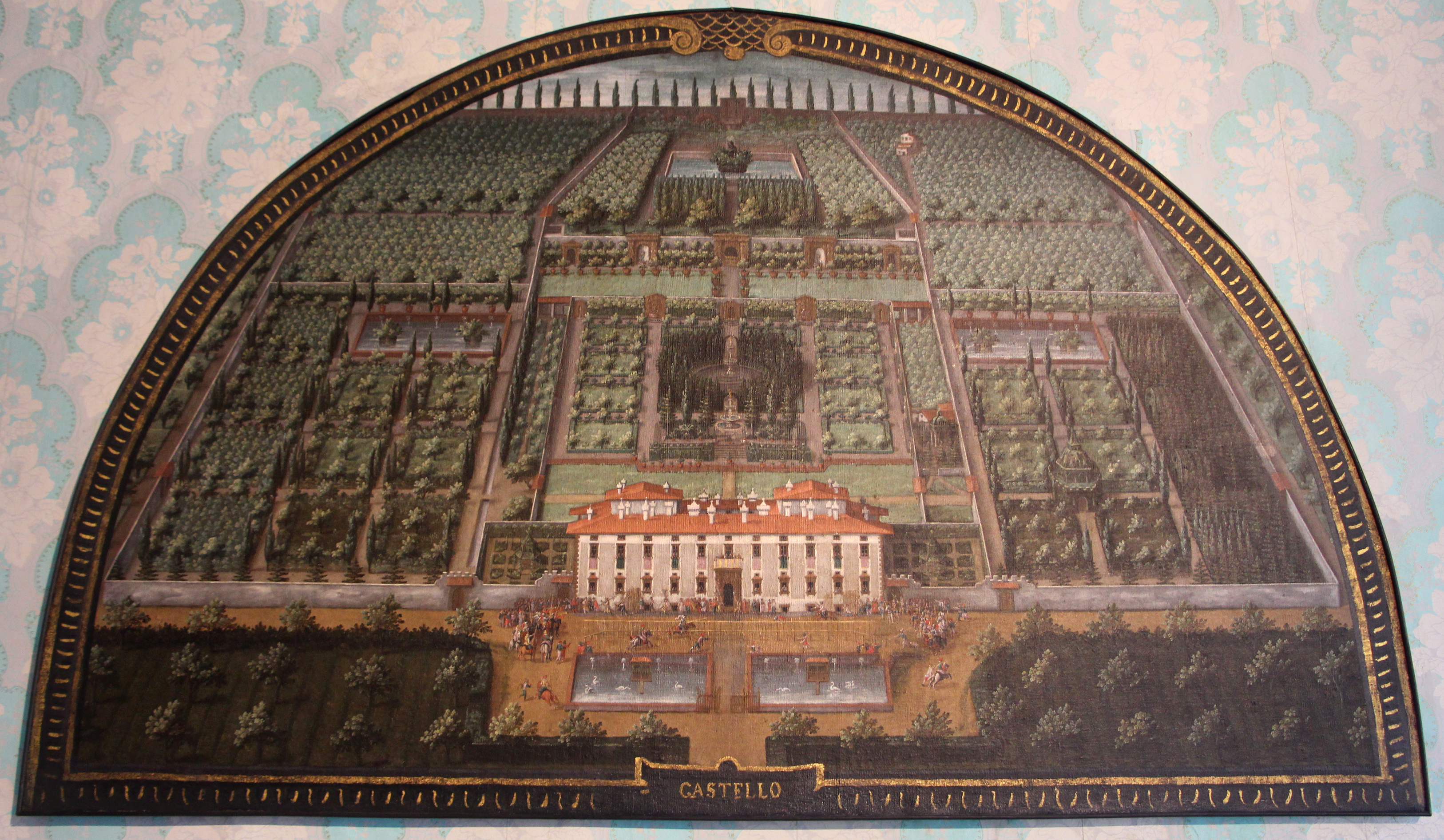 Villa medicea della Petraia - MIBAC The making of this document was supported by Wikimedia CH. (Submit your project!) For all the files concerned, please see the category Supported by Wikimedia CH. This is a photo of a monument which is part of cultural heritage of Italy.